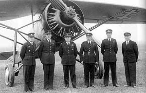 Lithuanian pilots (from left): Romualdas Marcinkus, Jonas Liorentas, Antanas Gustaitis, Juozas Namikas, Jonas Mikėnas, Kazys Rimkevičius near ANBO-51 plane.